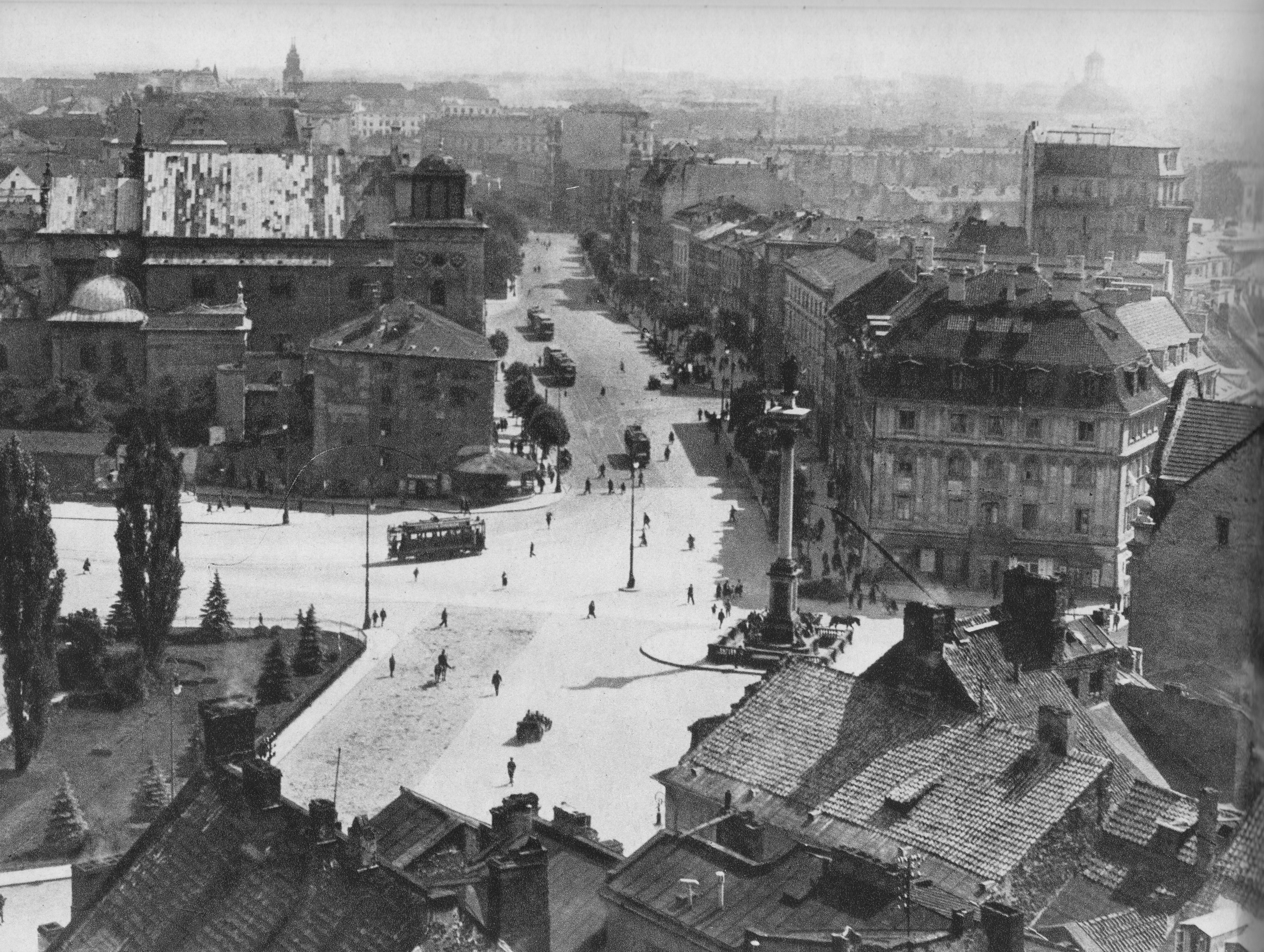 Plac Zamkowy i Krakowskie Przedmieście w Warszawie w okresie międzywojennym